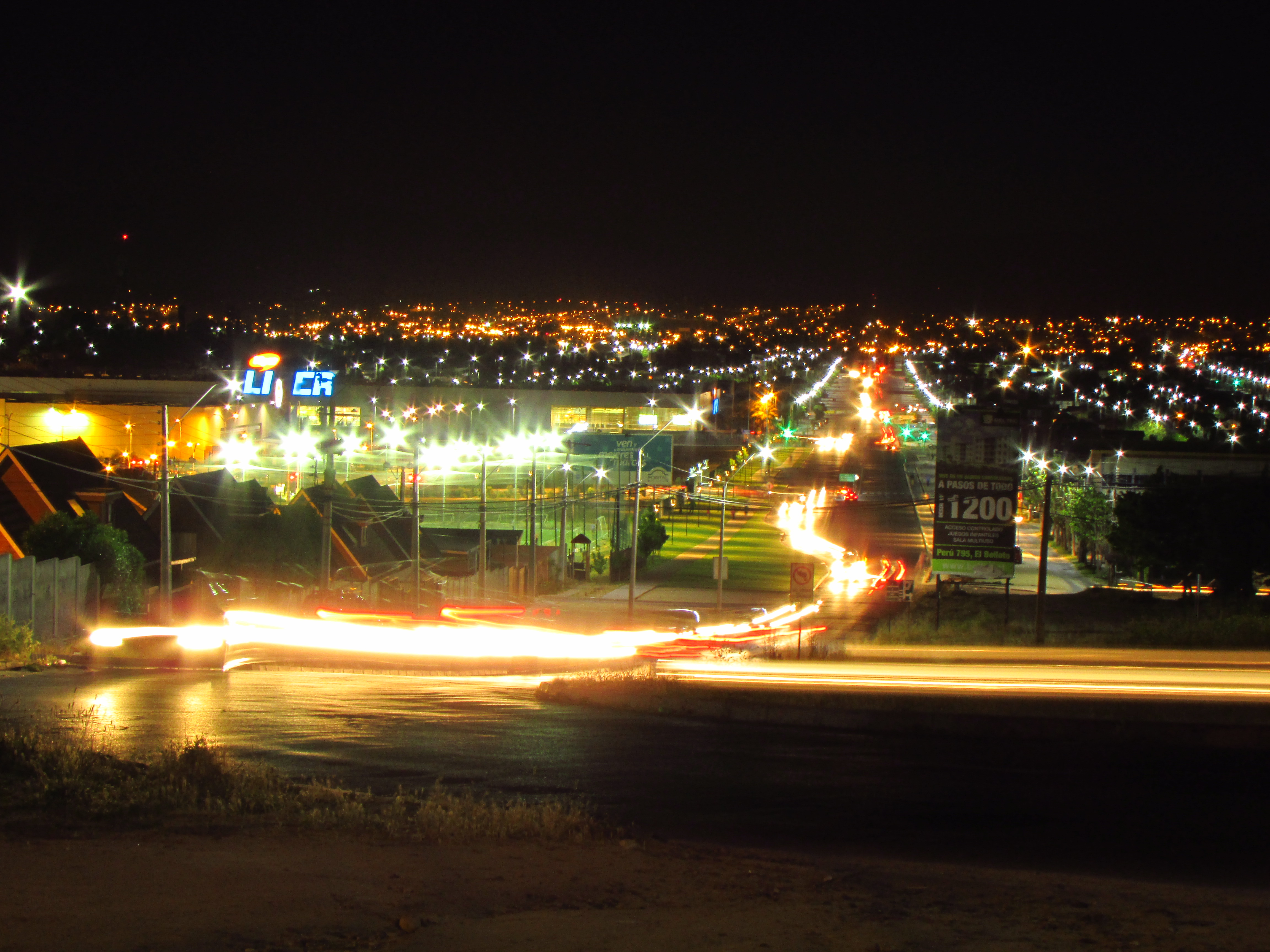 Vista desde Oeste de El Belloto